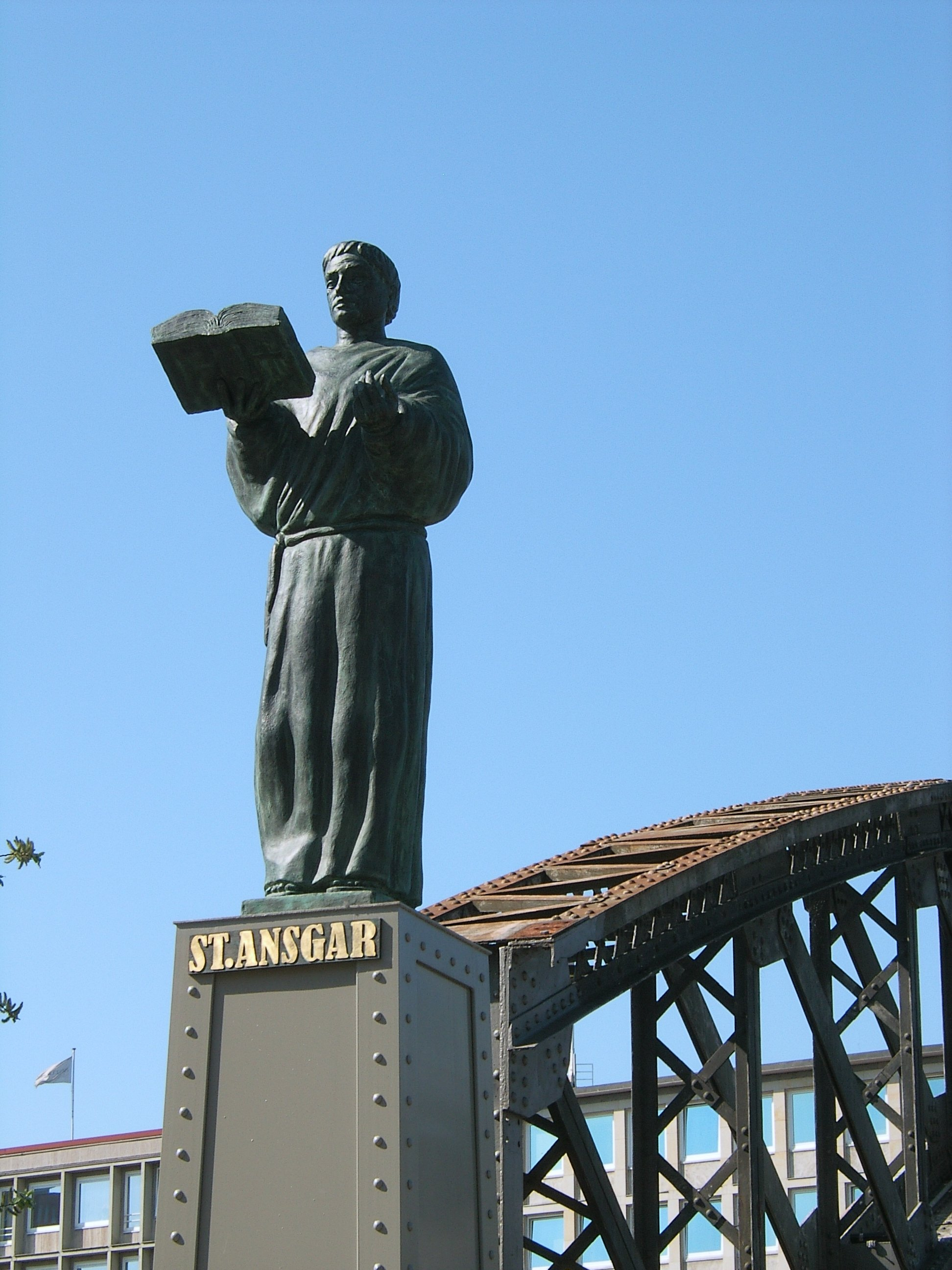 Figur des Heiligen Ansgar an der Brooksbrücke (Südseite, Speicherstadt) in Hamburg-HafenCity